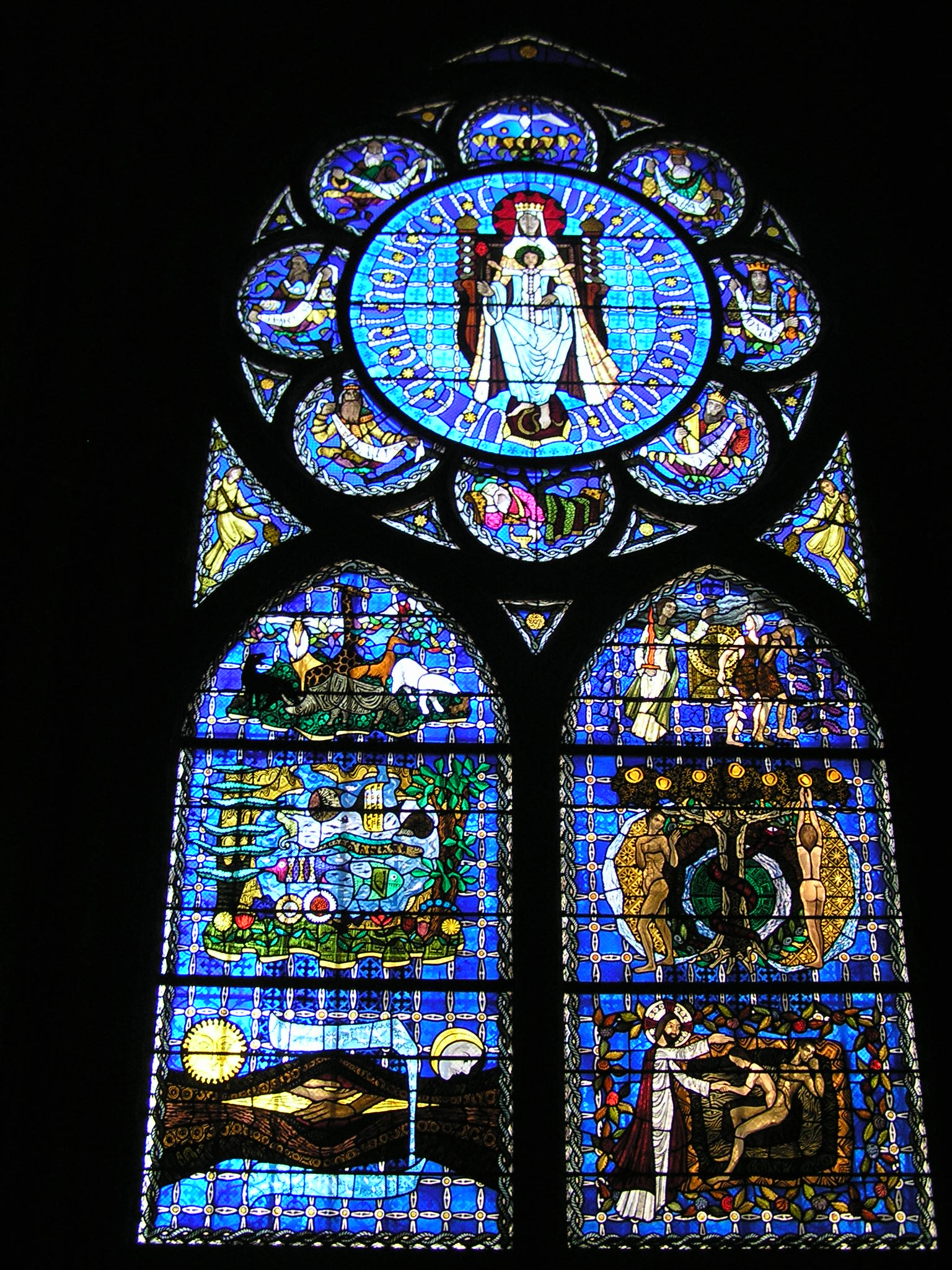 vitrail moderne de la cathédrale de Clermont-Ferrand